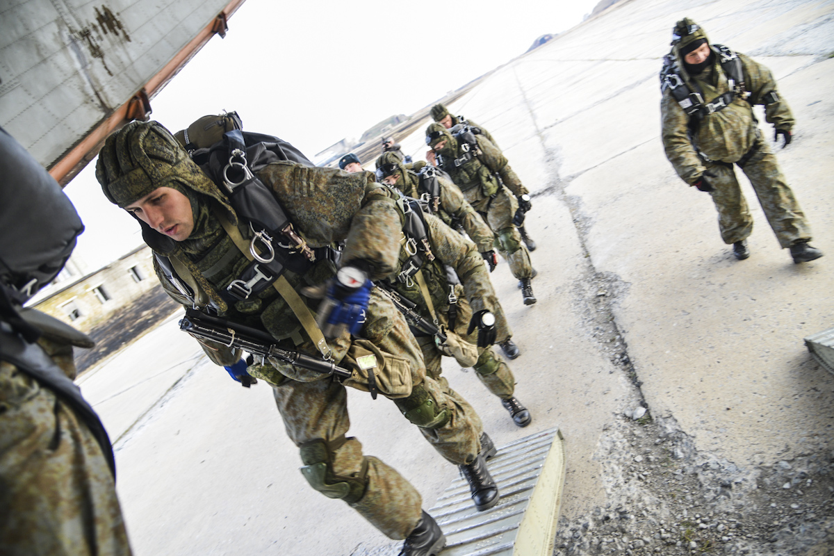 Парашютисты 83-й отдельной десантно-штурмовой бригады с парашютными системами Арбалет-2 заходят в Ил-76 во время активной фазы тактического учения с соединением ВДВ в Уссурийске.